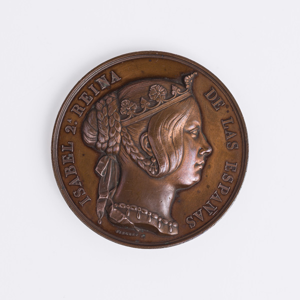 Medalla. Imposición de las Corbatas de la Orden de San Fernando al Regimiento de Ingenieros.